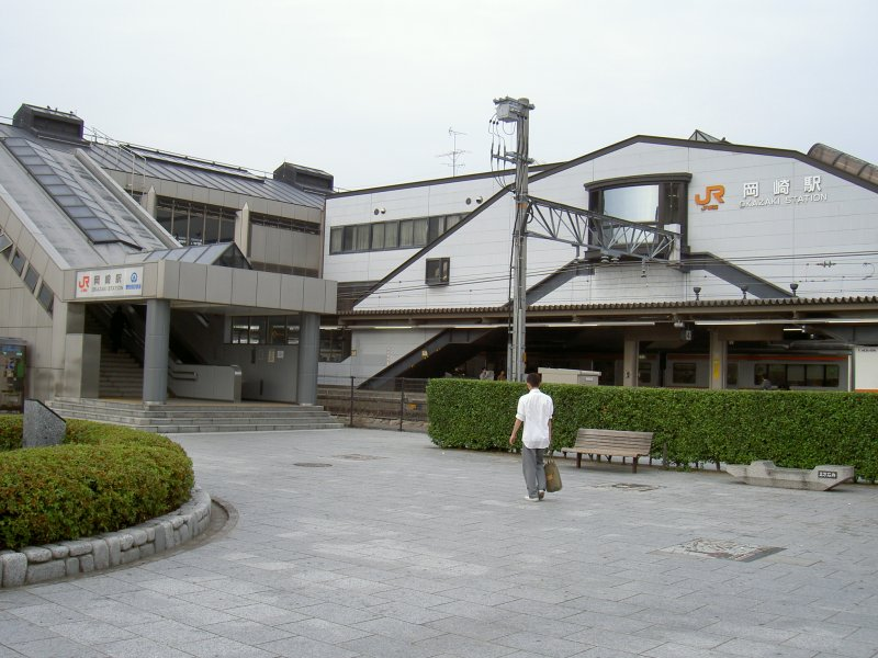 200506に投稿者が撮影。東海道本線、愛知環状鉄道岡崎駅西口